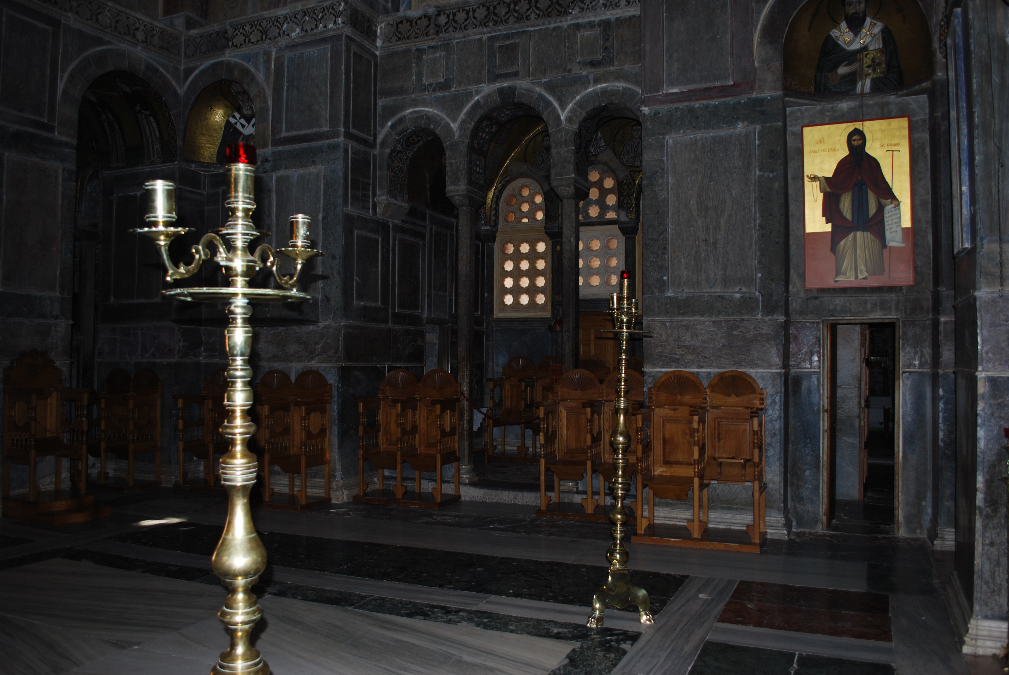 Vue du monastère de Hosios Loukas, en Béotie.